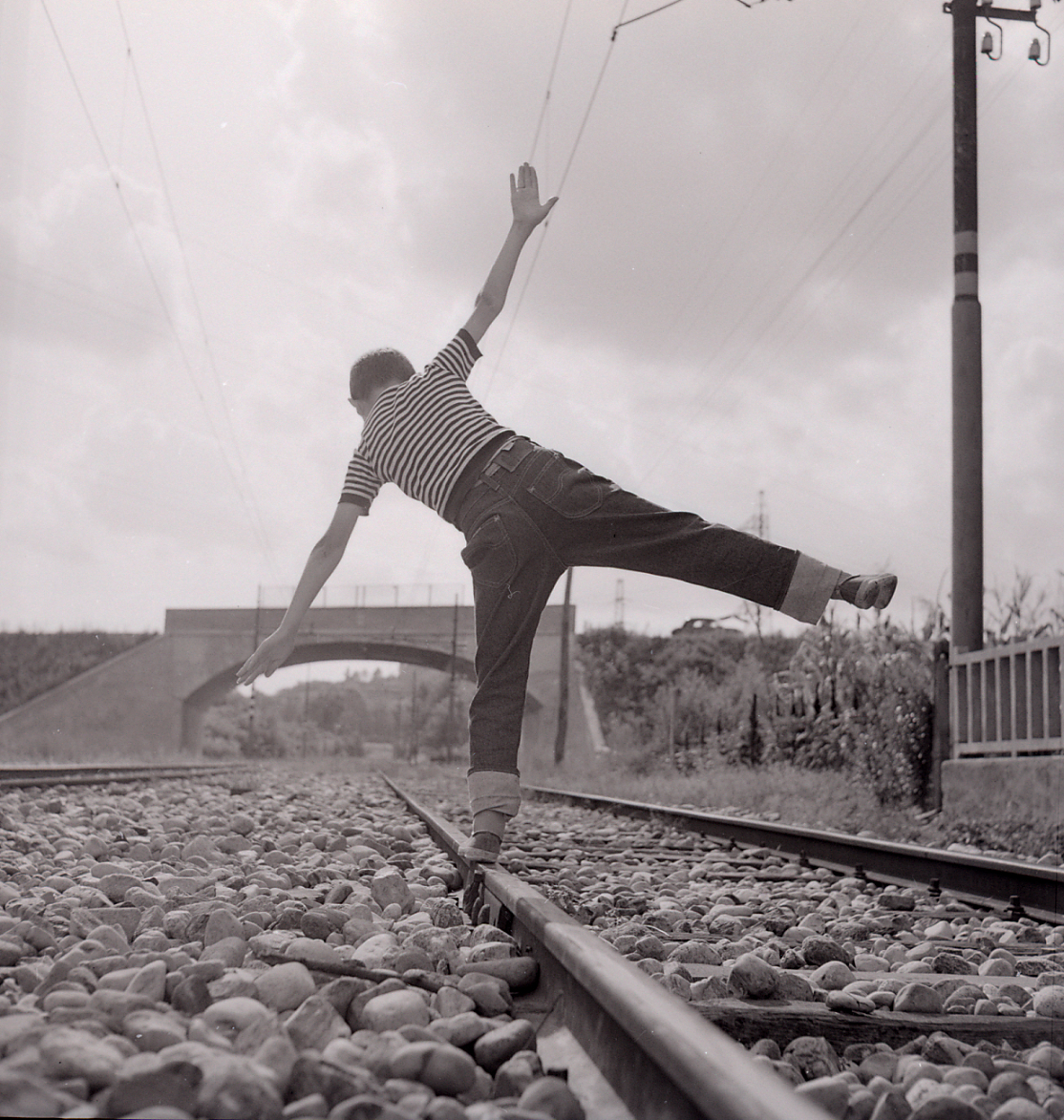 Serie fotografica : Sesto San Giovanni, 1970 / Paolo Monti. - Buste: 3, Fototipi: 3 : Negativo b/n, gelatina bromuro d'argento/ pellicola ; 6x6. - ((Serie costituita da 3 negativi identificati con i nn.: 21567-21570. Sulla busta R21568 manoscritto: "Pierrel". Numerazione parallela: 217-219. La suddetta serie è contenuta nella scatola identificata con la numerazione 21559-21766. Sulla scatola manoscritto con pennarello nero: "Industrie". - : IV . Commesse/ Fattura n. 32/ Fotografie d'archivio per volume sulla Triennale di Milano (1977/11/28), presso Archivio Paolo Monti. n. 15 fotografie decime Triennale di Milano 1954Fattura di Paolo Monti. - Fonte